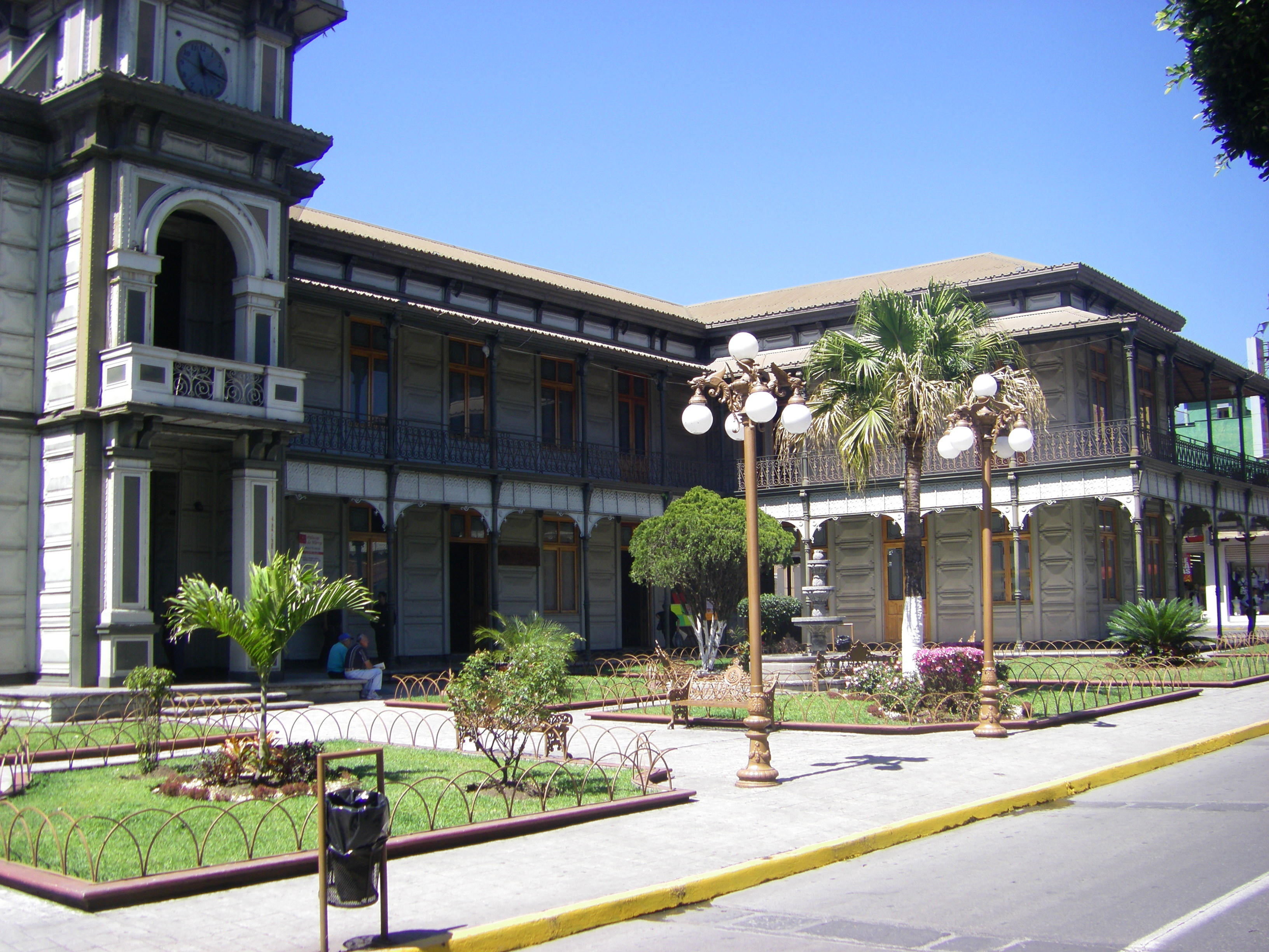 altes Rathaus von Orizaba